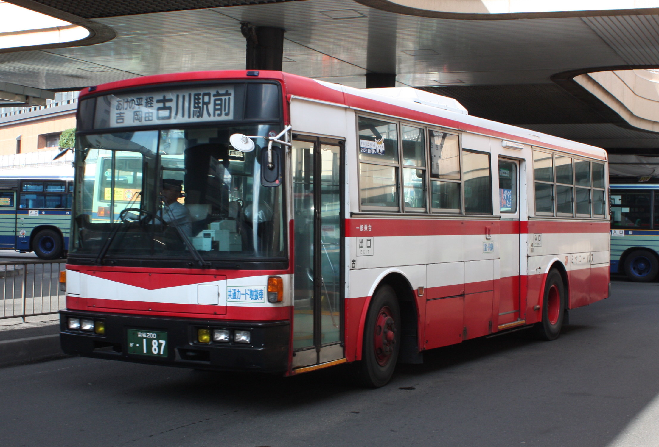 宮城交通 宮城200か187 仙台駅西口にて 宮城交通 宮城200か187 仙台駅西口にて